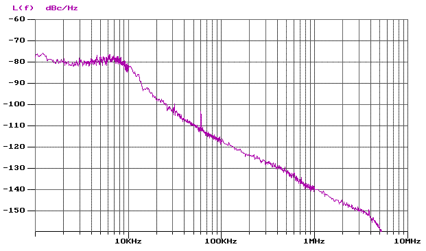 Beispielergebniss einer Phasenrauschen-Messung eines Oszillators.